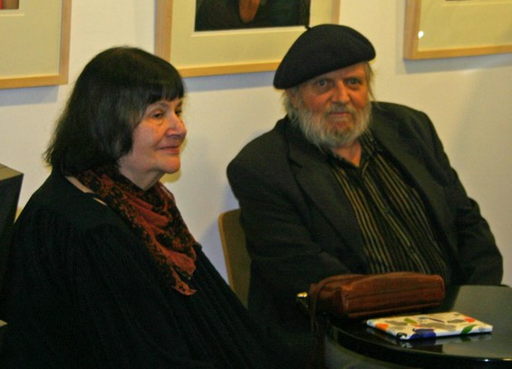 Die Dresdener Künstler Herta und Jürgen Günther während einer Ausstellungseröffnung in Berlin-Mitte.